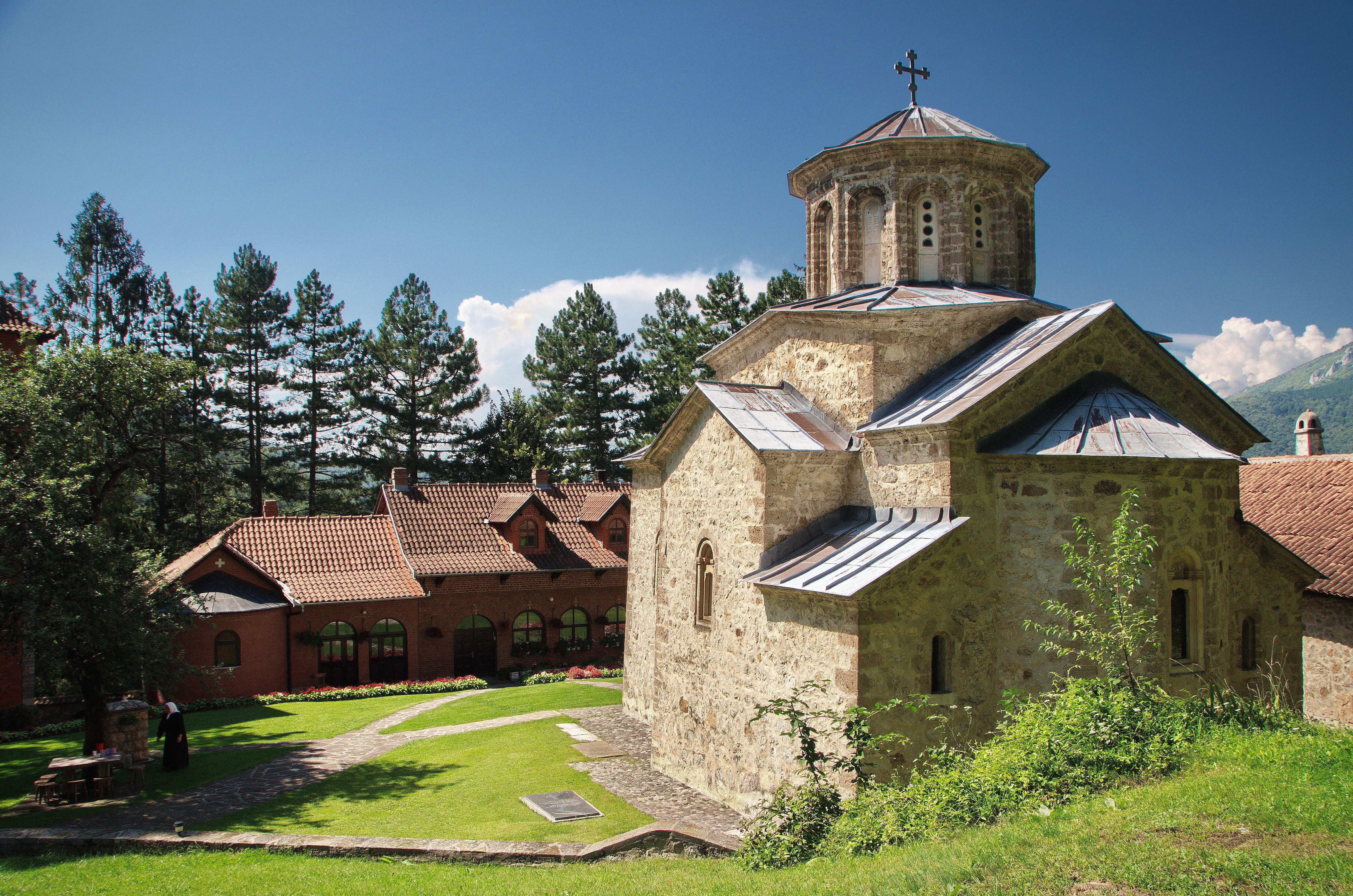 По изузетним архитектонским вредностима, Црква Свете Тројице предњачи међу другим споменицима у Овчарско-кабларској клисури.